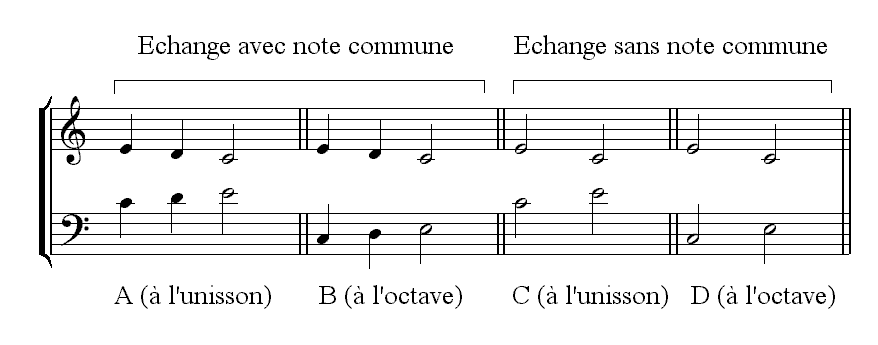 Description : Echange Source : Personnelle Licence : GFDL